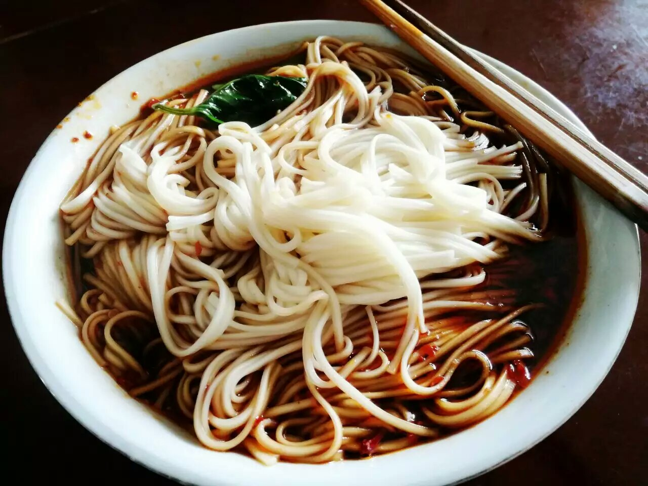 中文（中国大陆）: 素小面指不加牛肉、杂酱等任何配料的小面，是最常见的小面，也是狭义上的小面。